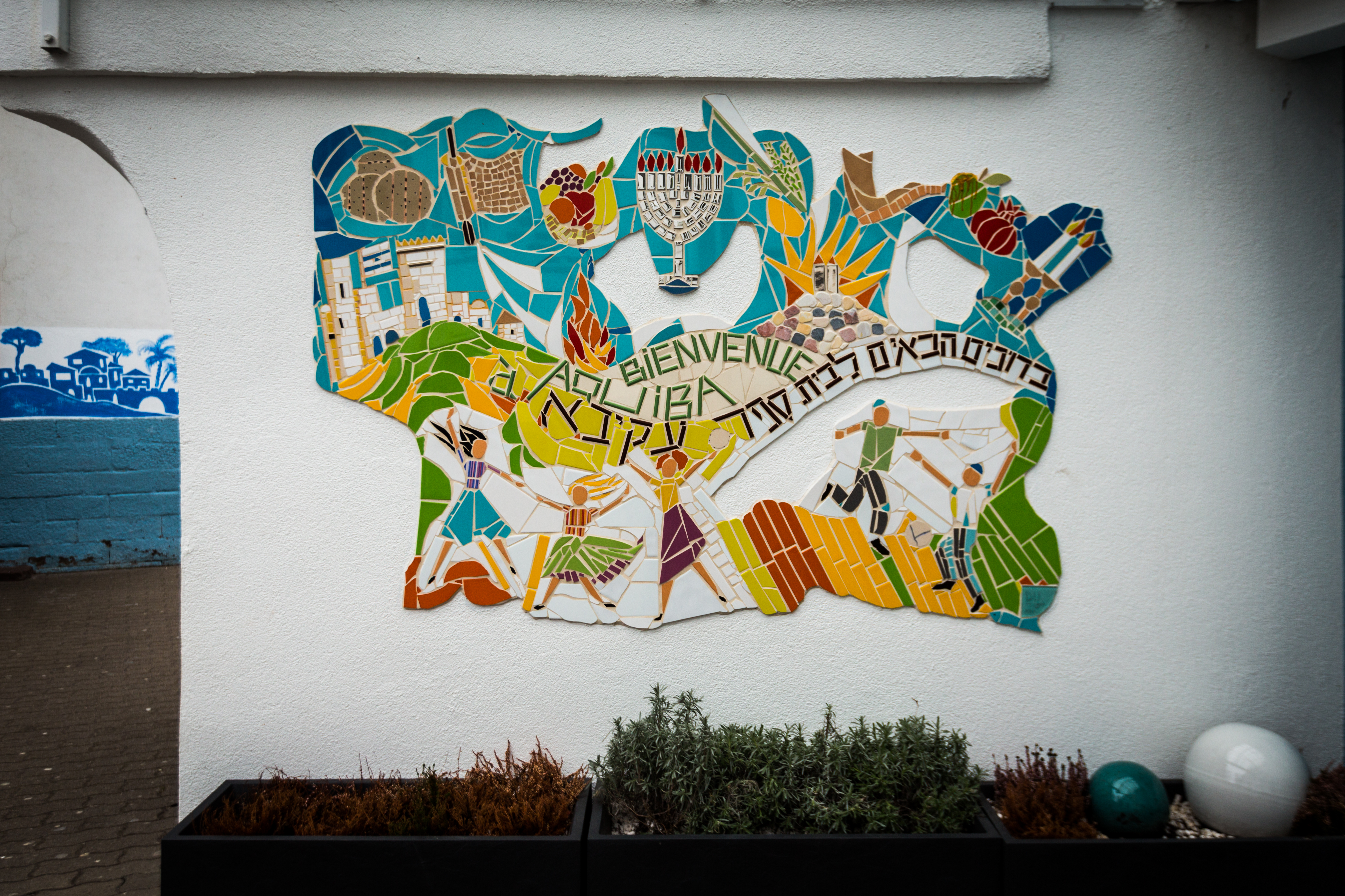 Strasbourg mosaïque bienvenue à l'école Aquiba